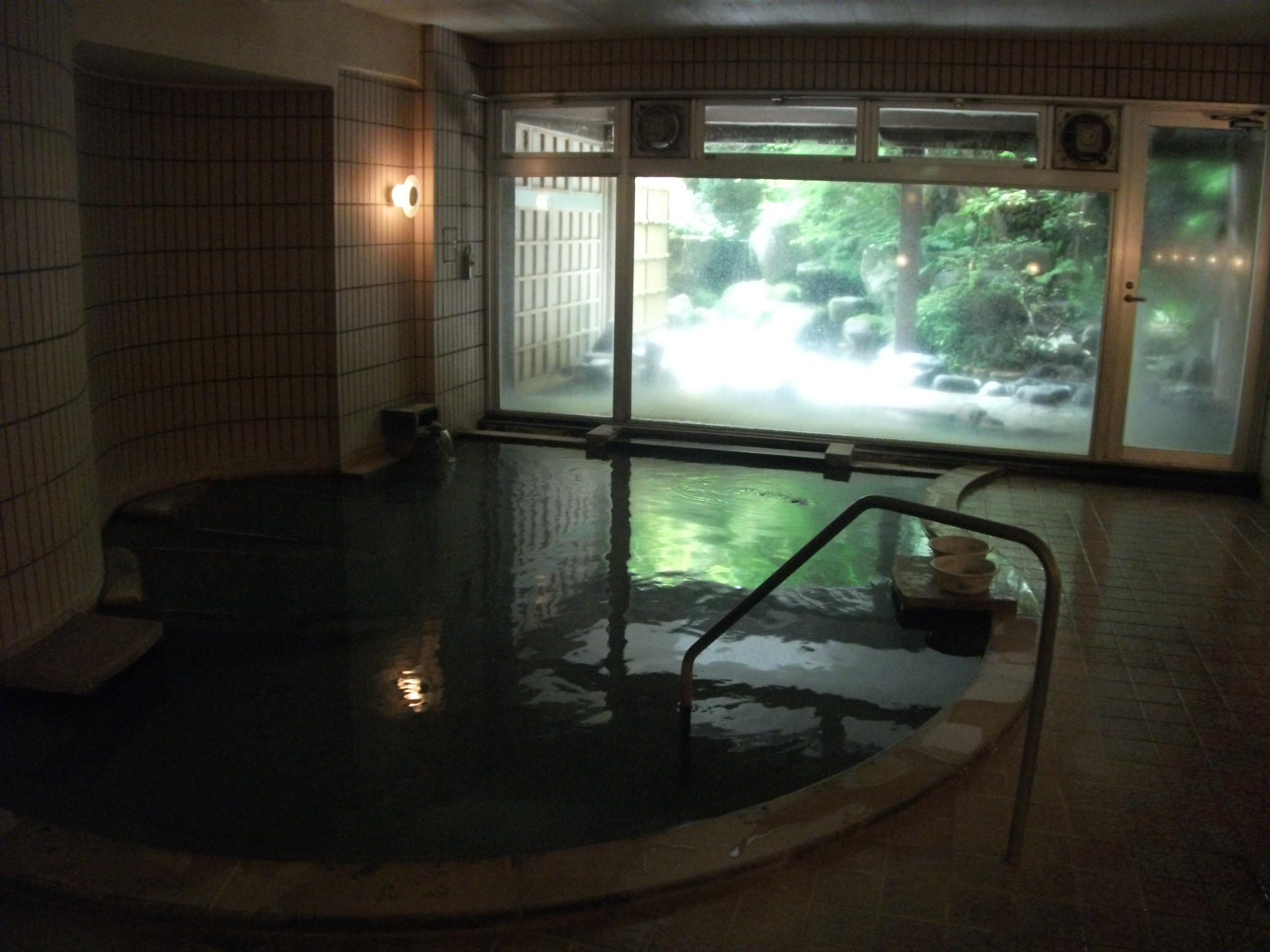 長野県軽井沢町、塩壺温泉